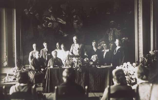 Generalversammlung des Deutsch-Evangelischen Frauenbundes in Stralsund, 1927, Gröben, Selma von der (1.R., 2.v.li.n.re.); Müller-Otfried, Paula (am Pult stehend); Bennigsen, Adelheid von; Jorns, Auguste